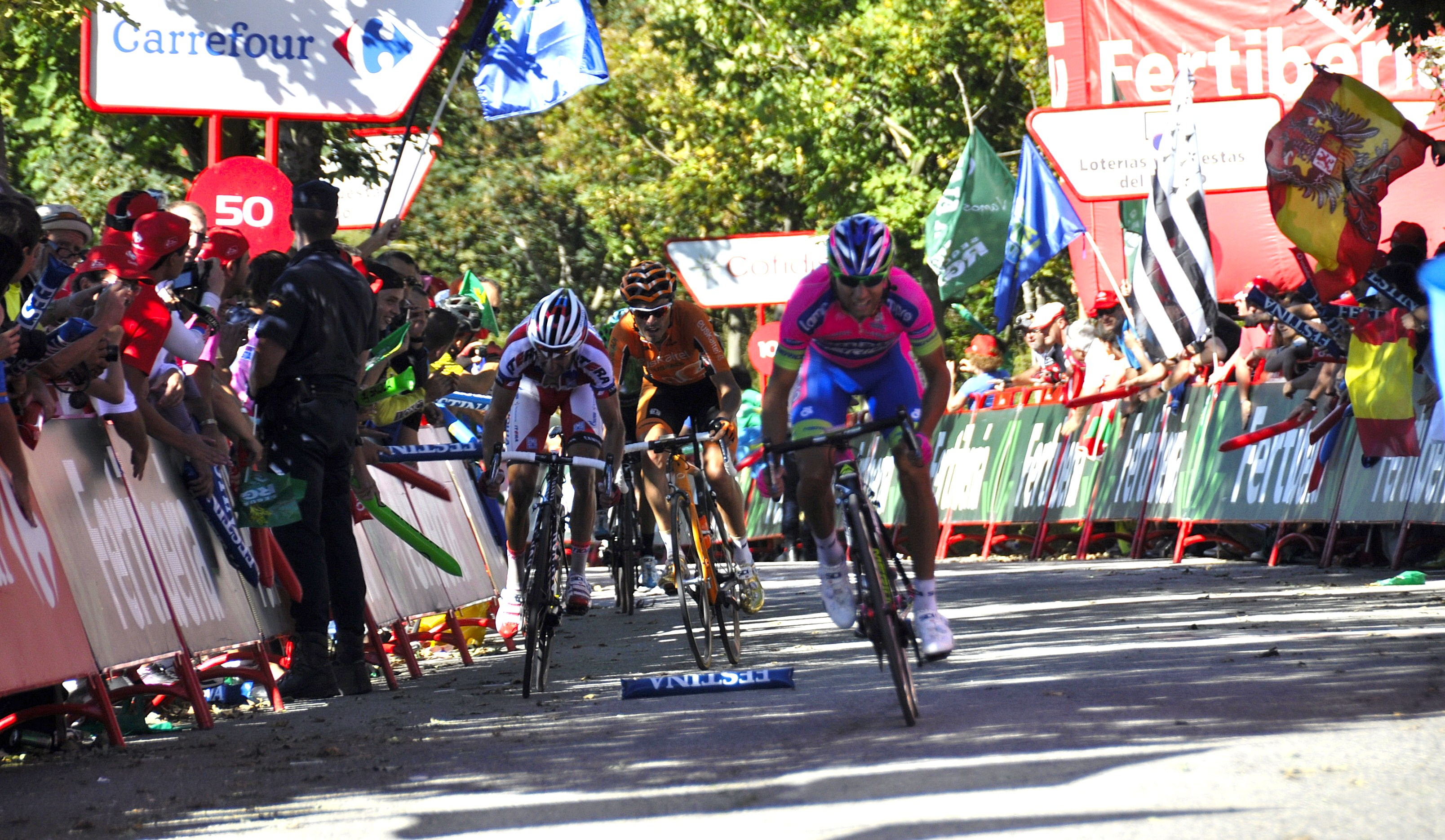 Lucha entre Diego Ulissi (Lampre), Dani Moreno (Katusha) y Samuel Sánchez (Euskaltel) por el segundo puesto.